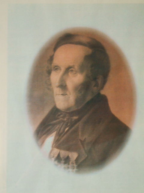 Stralsund, Marinemuseum.